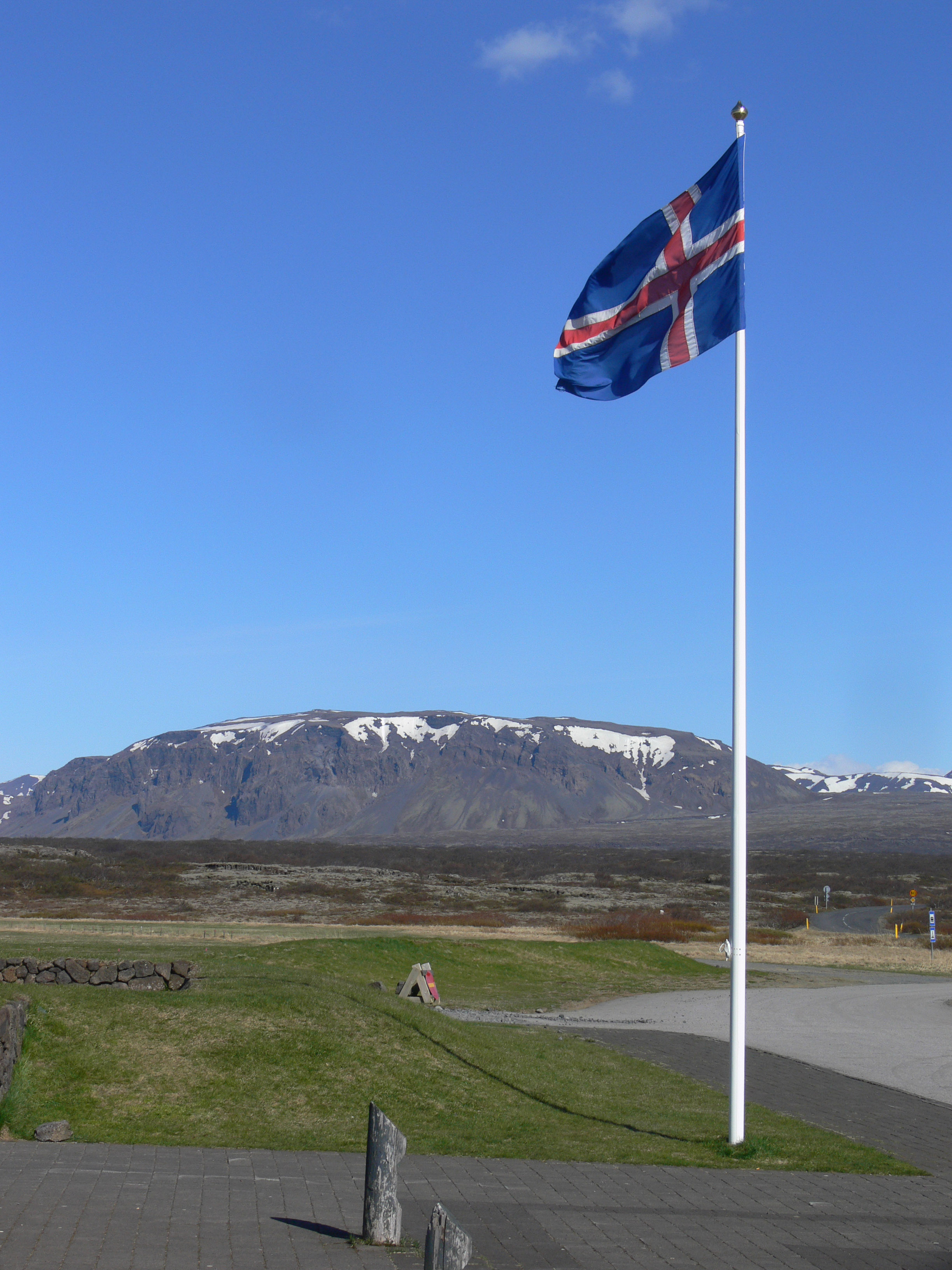 Sicht auf Hrafnabjörg